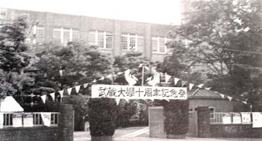 武藏大學十周年記念祭